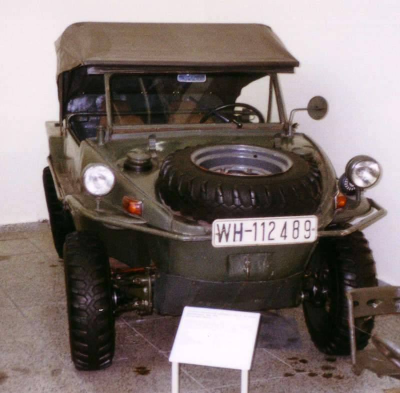 VW Schwimmwagen, Armeemuseum Dresden